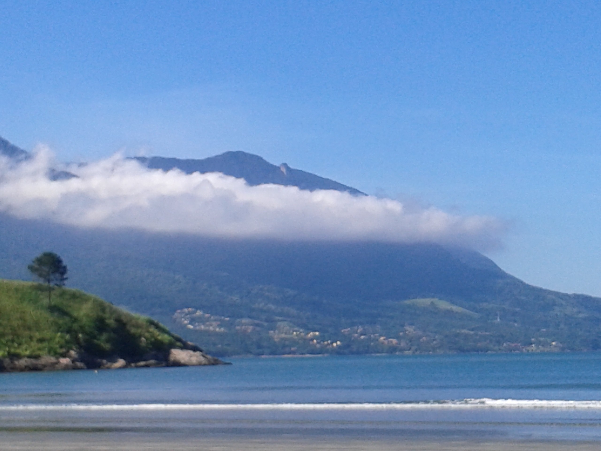 praia p